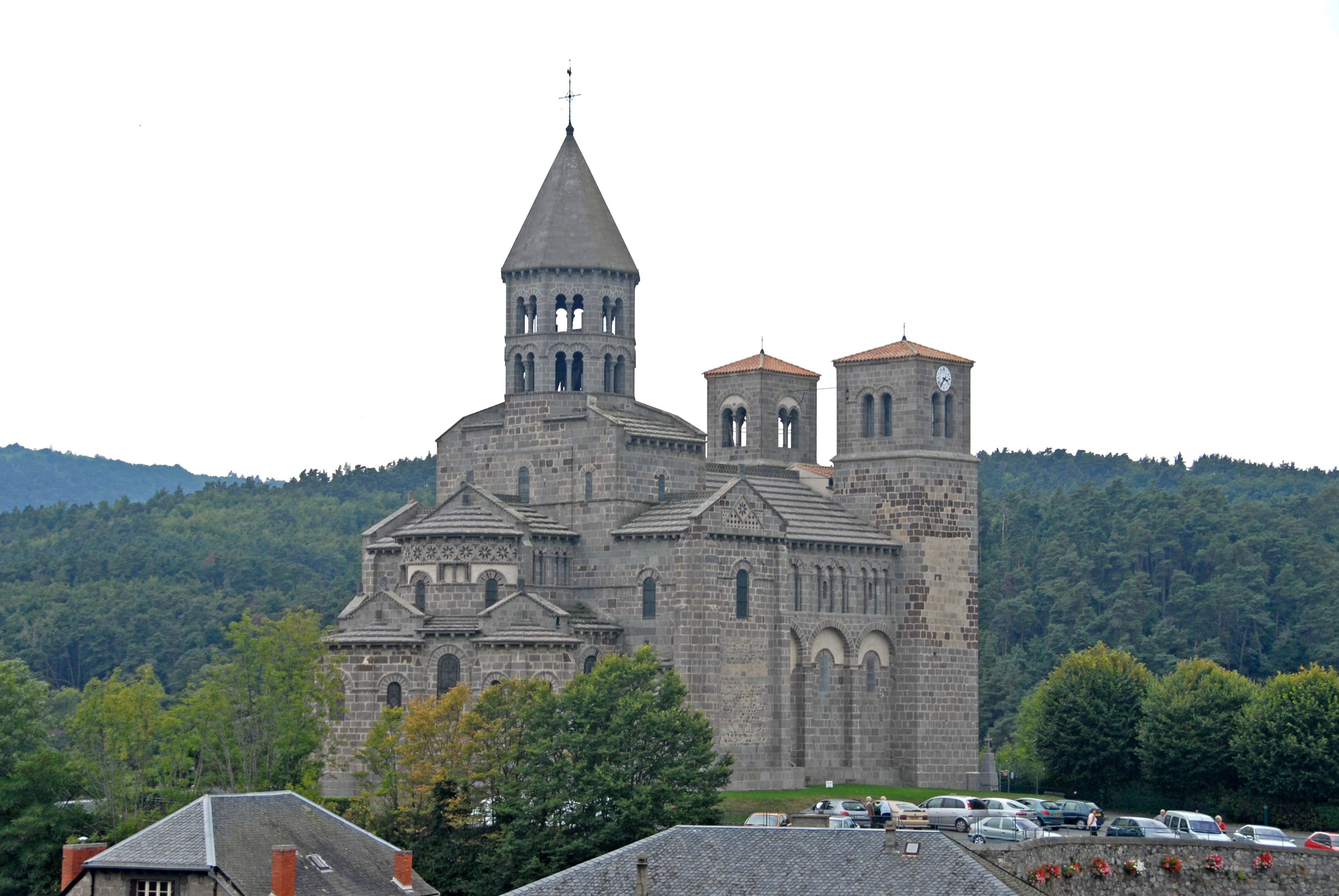 St.-Nectaire, Überblick von SW